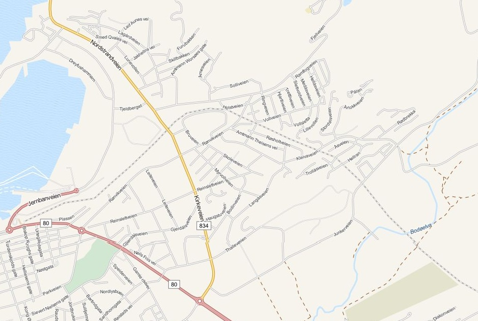 Dette kartet viser hovedveiene i bydelen Rønvika i Bodø, Nordland. Bildet er hentet fra